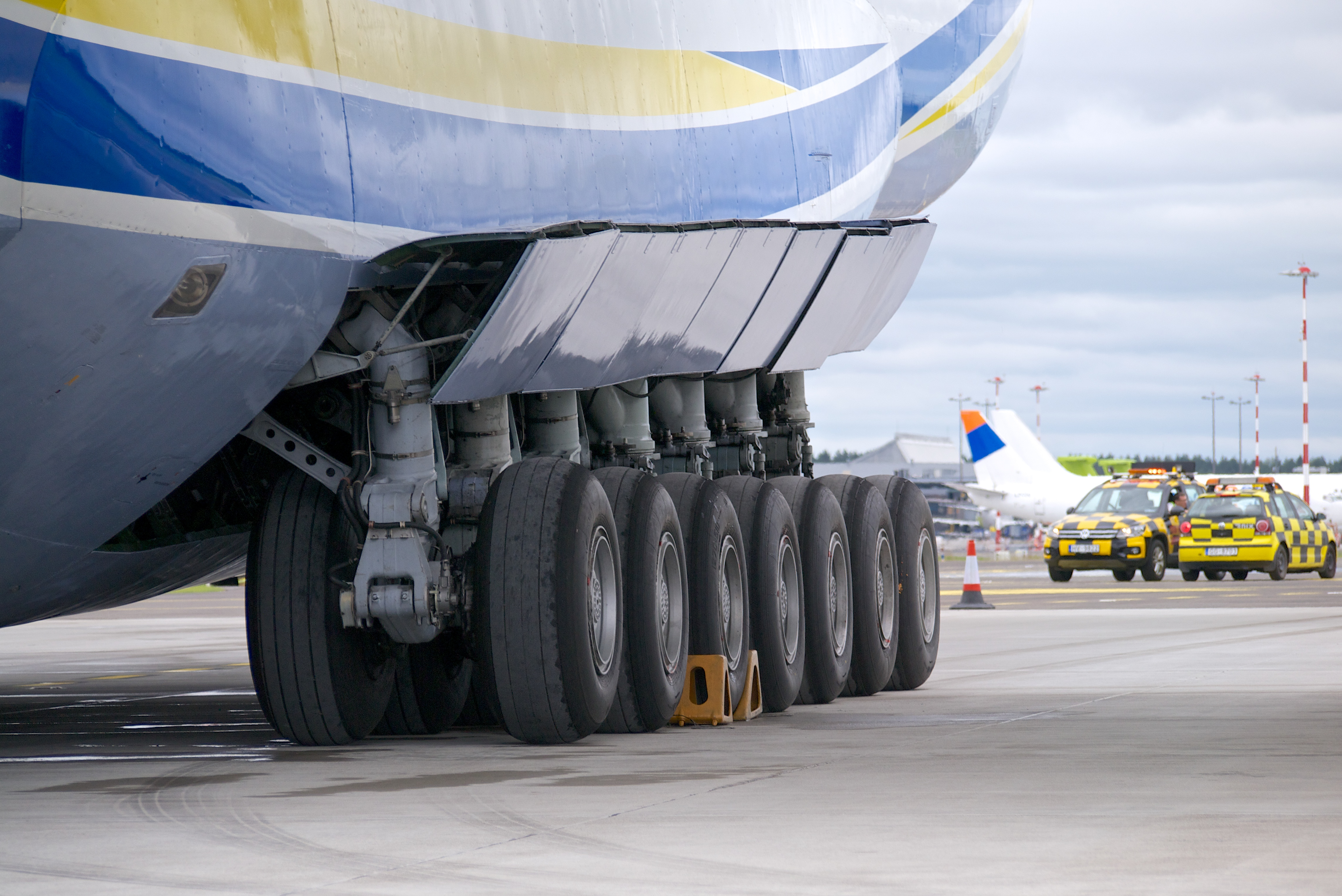 Antonov An-225 Mriya